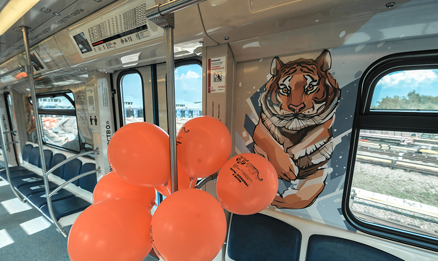 Изображение тигра в салоне электропоезда метро 81-760/761 "Полосатый экспресс-2"